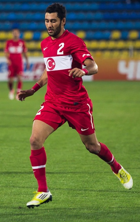 Veysel Sarı, Türkiye A2 Milli Takımı formasıyla.